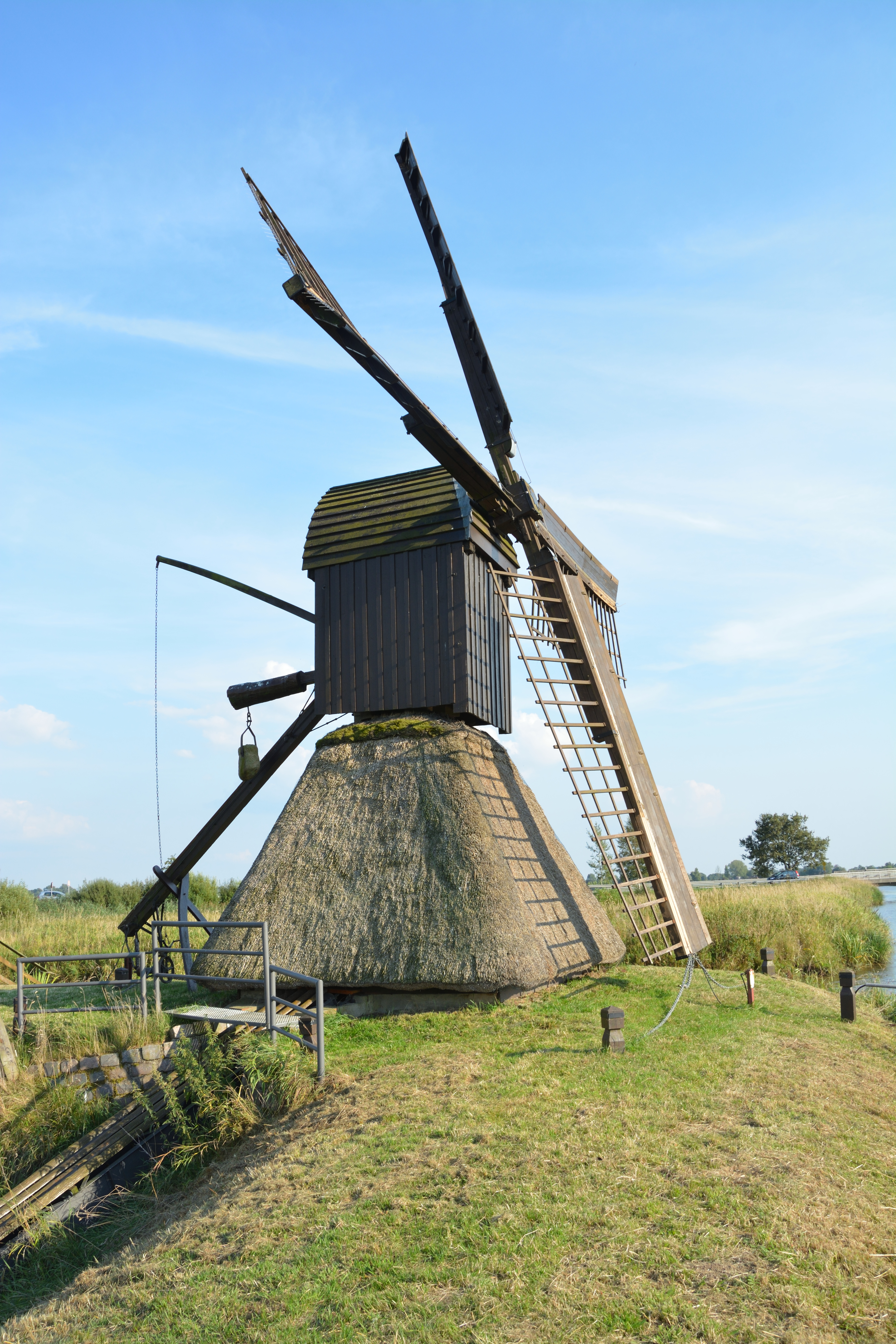 Die Schöpfmühle